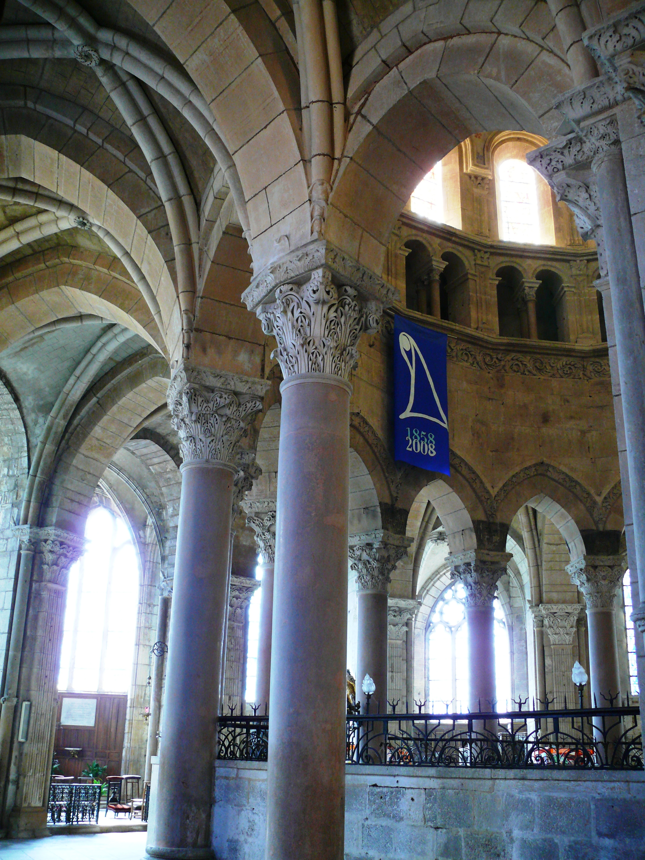 Langres - Cathédrale Saint-Mammès - Déambulatoire